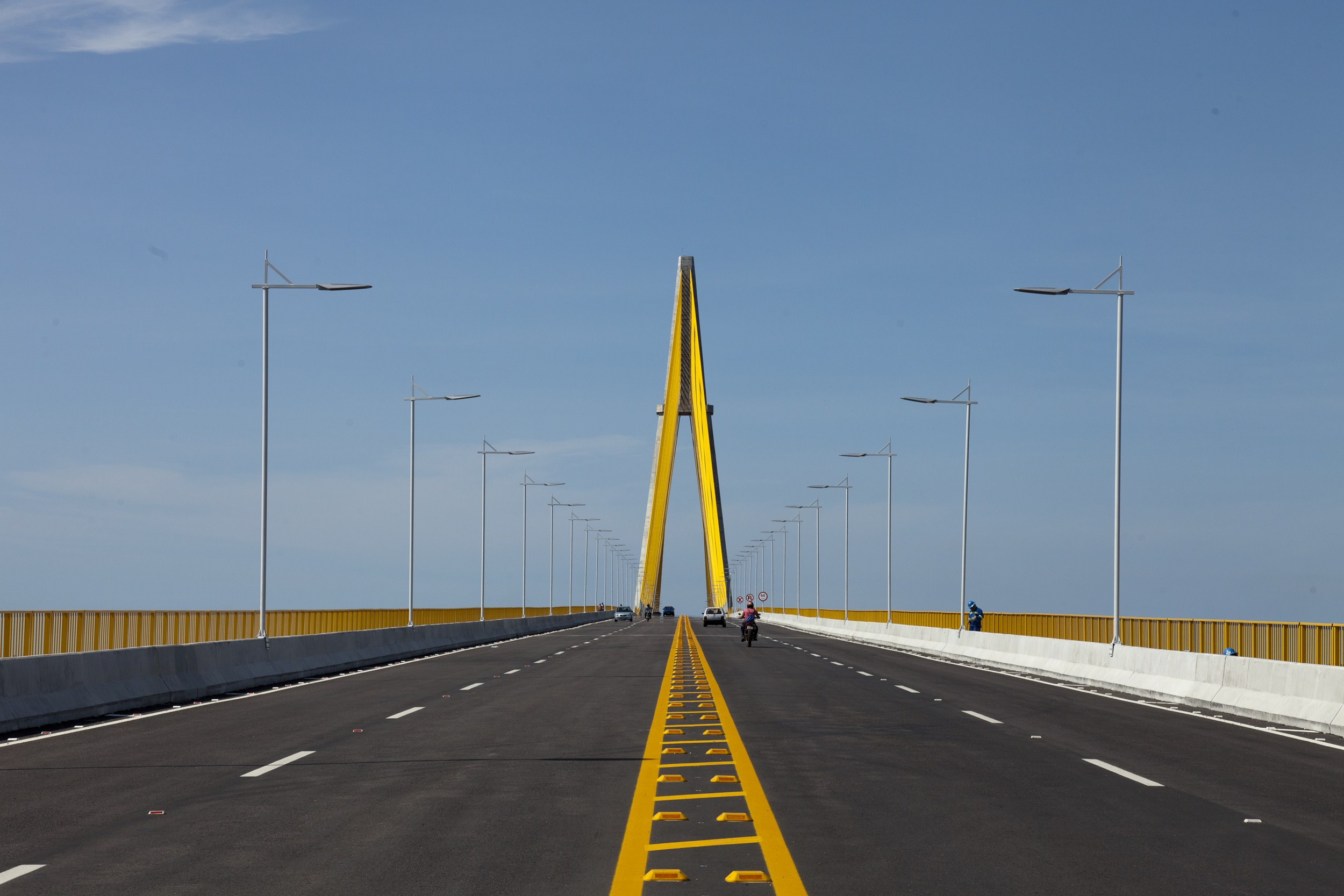 Faixas de rolamento da Ponte Jornalista Phelippe Daou, no Estado do Amazonas, Brasil.